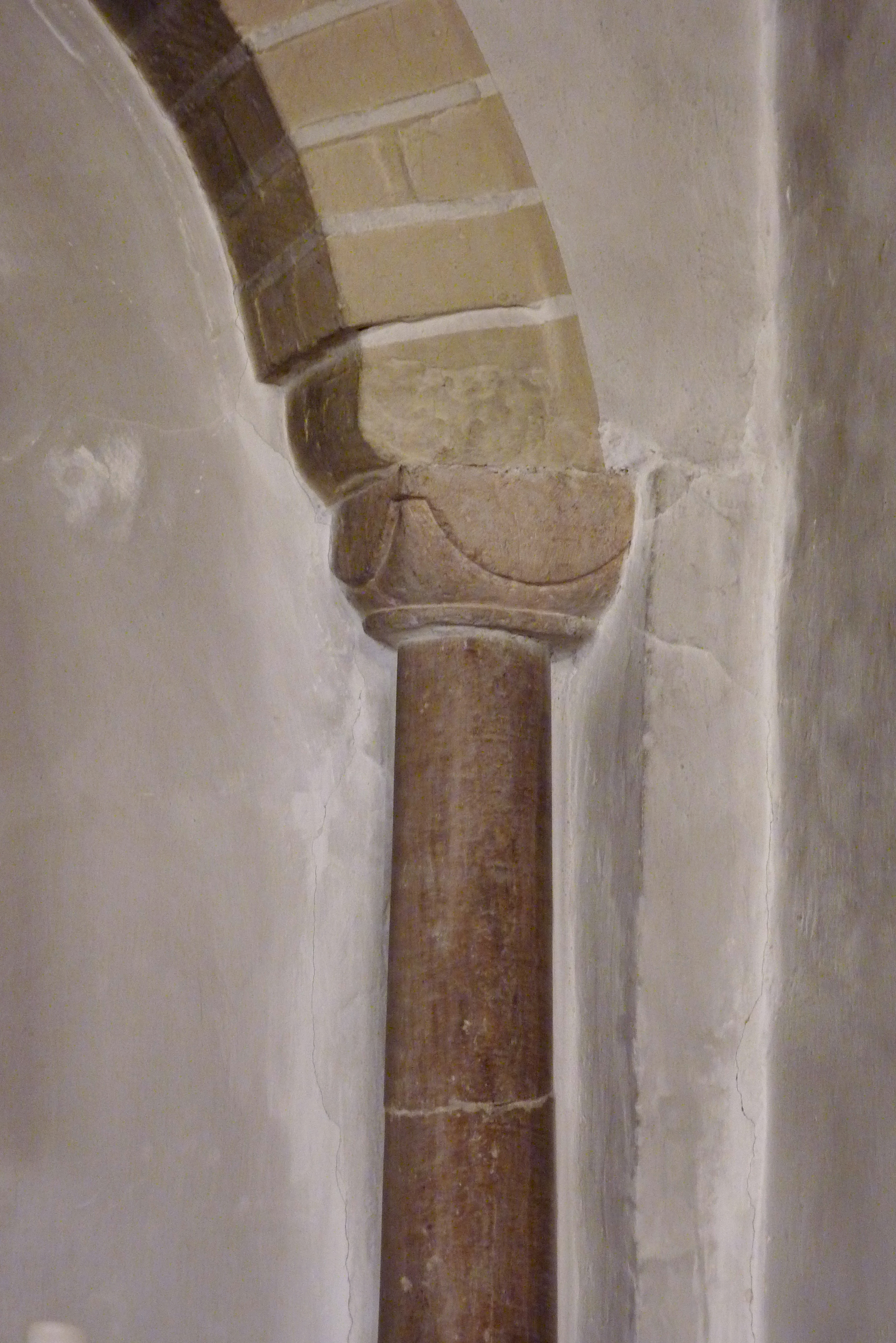 Alte katholische Pfarrkirche St. Peter und Paul in Odendorf, einem Ortsteil von Swisttal im Rhein-Sieg-Kreis (Nordrhein-Westfalen), romanisches Würfelkapitell